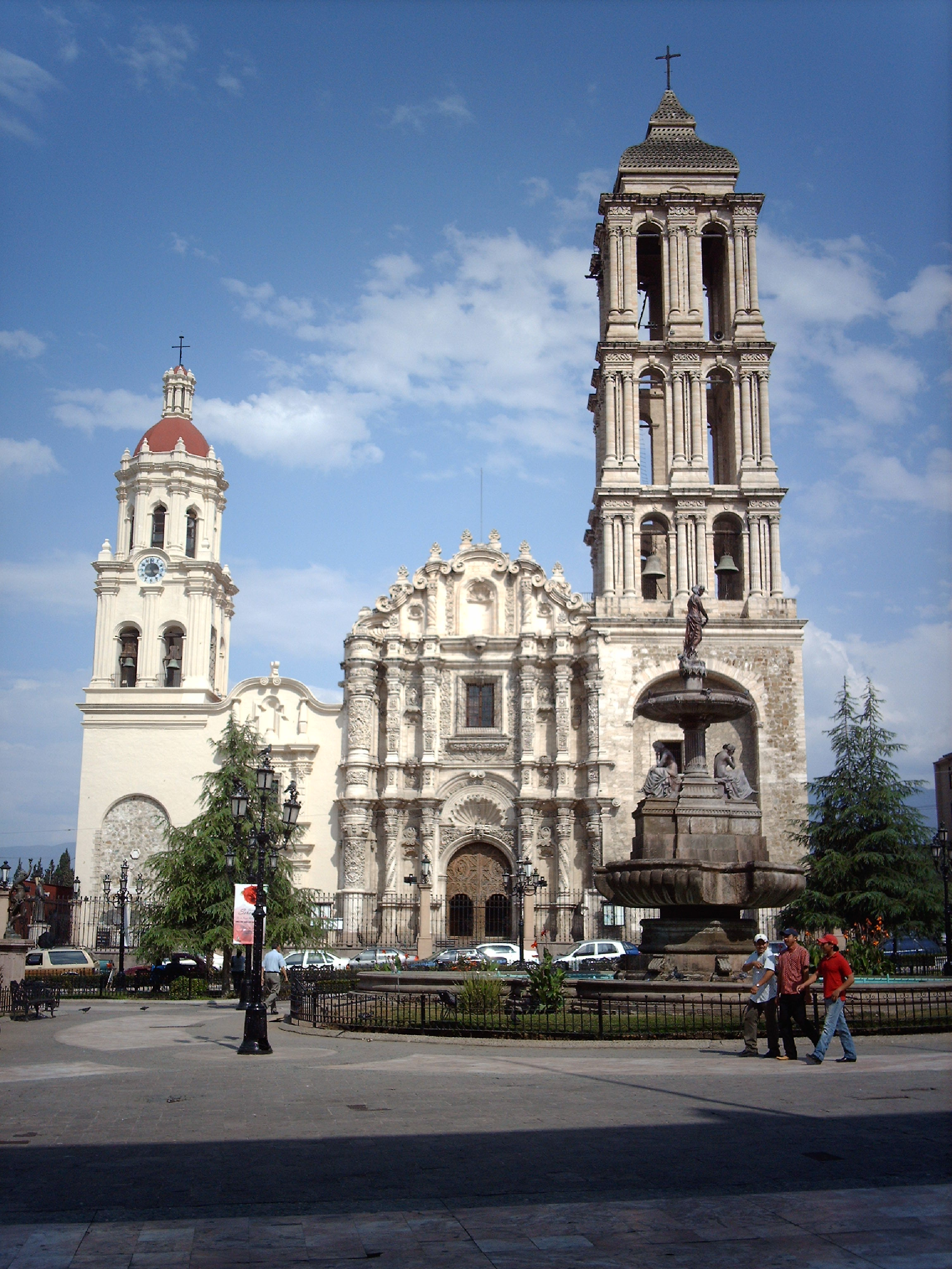 Façade de la Cathédrale Santiago a Saltillo, état de Coahuila, Mexique